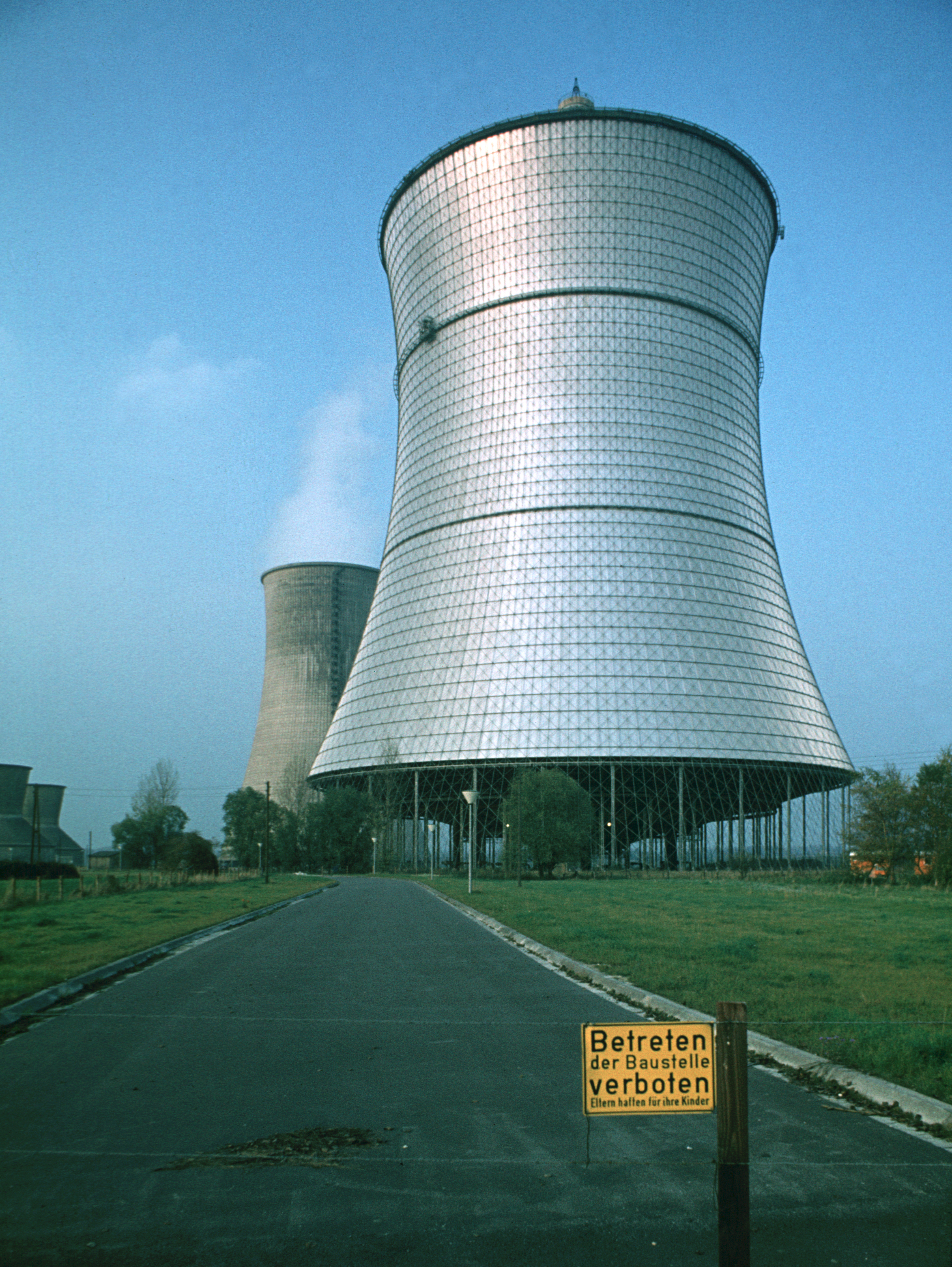 Trockenkühlturm des THTR-300 in Hamm-Uentrop kurz vor der Fertigstellung des Kraftwerks. Der Turm wurde 1991 abgerissen. Im Hintergrund die Kühltürme des benachbarten Kohleblocks. Aufnahme mit Minolta XE-5 und Rokkor MC 2.8/24mm auf Agfa CT18